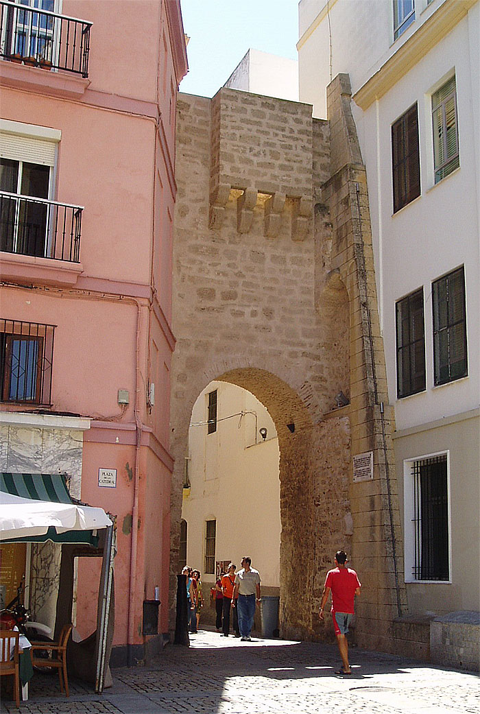 Arco de la Rosa, antigua puerta del Cádiz medieval. Cádiz, España. Se trata de la puerta occidental de la muralla de la ciudad, construida en el siglo XIII por Alfonso X el Sabio. Dicha muralla era de mampostería y cal, almenada y con torres, si bien en este lienzo era de menor grosor que en otras zonas. La muralla estaba formada por tres lienzos, que daban al oeste, al norte y al este, la parte sur quedaba sin cubrir por nos ser necesaria, debido a los difícil de su acceso. Denominado en tiempos Arco de Santiago, por dar al arrabal del mismo nombre, no está demasiado clara su actual denominación.